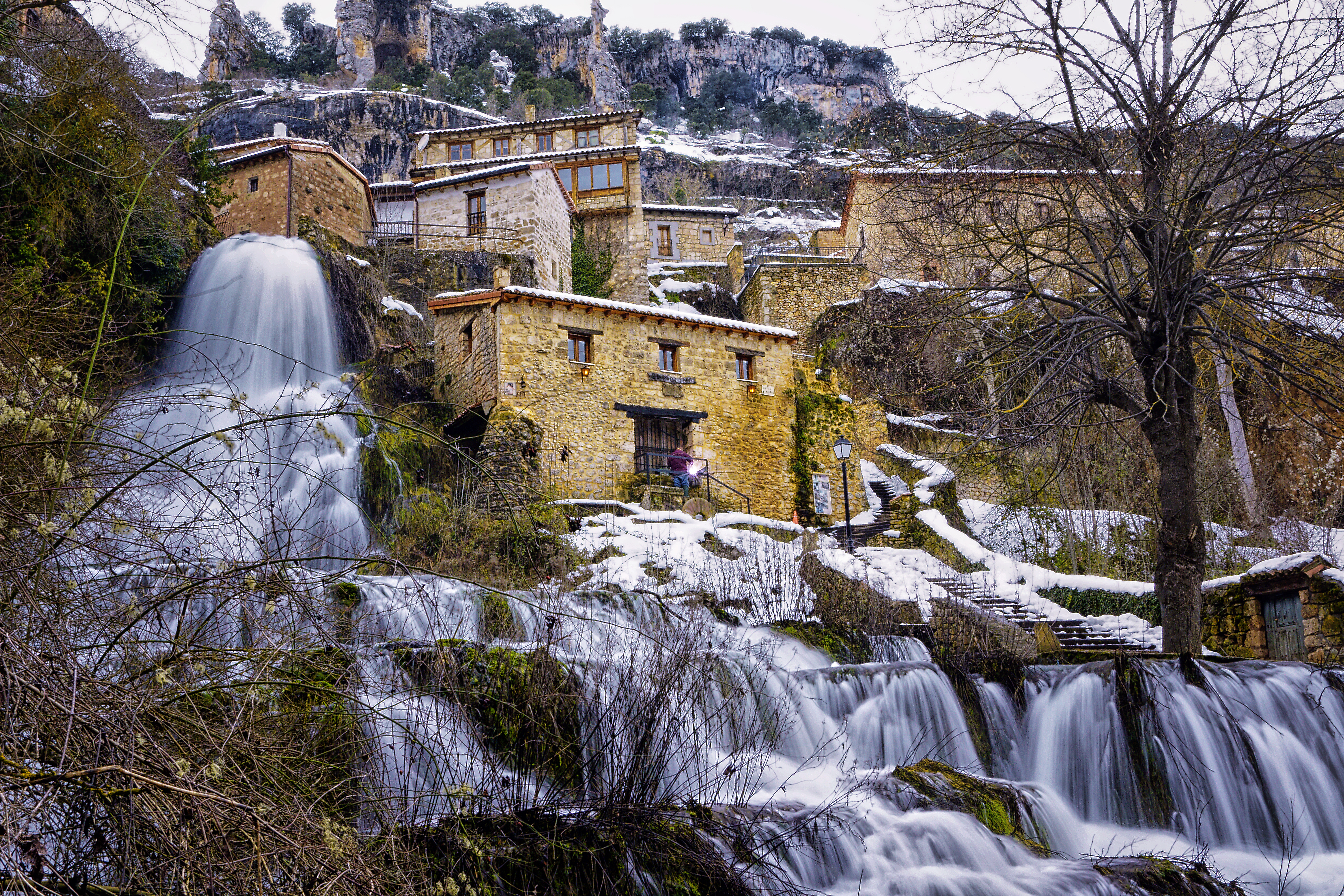 Riberas del río Ebro y afluentes This is a photography of a Special Area of Conservation in Spain with the ID: ES4120089. Natura2000 entry, EEA entry